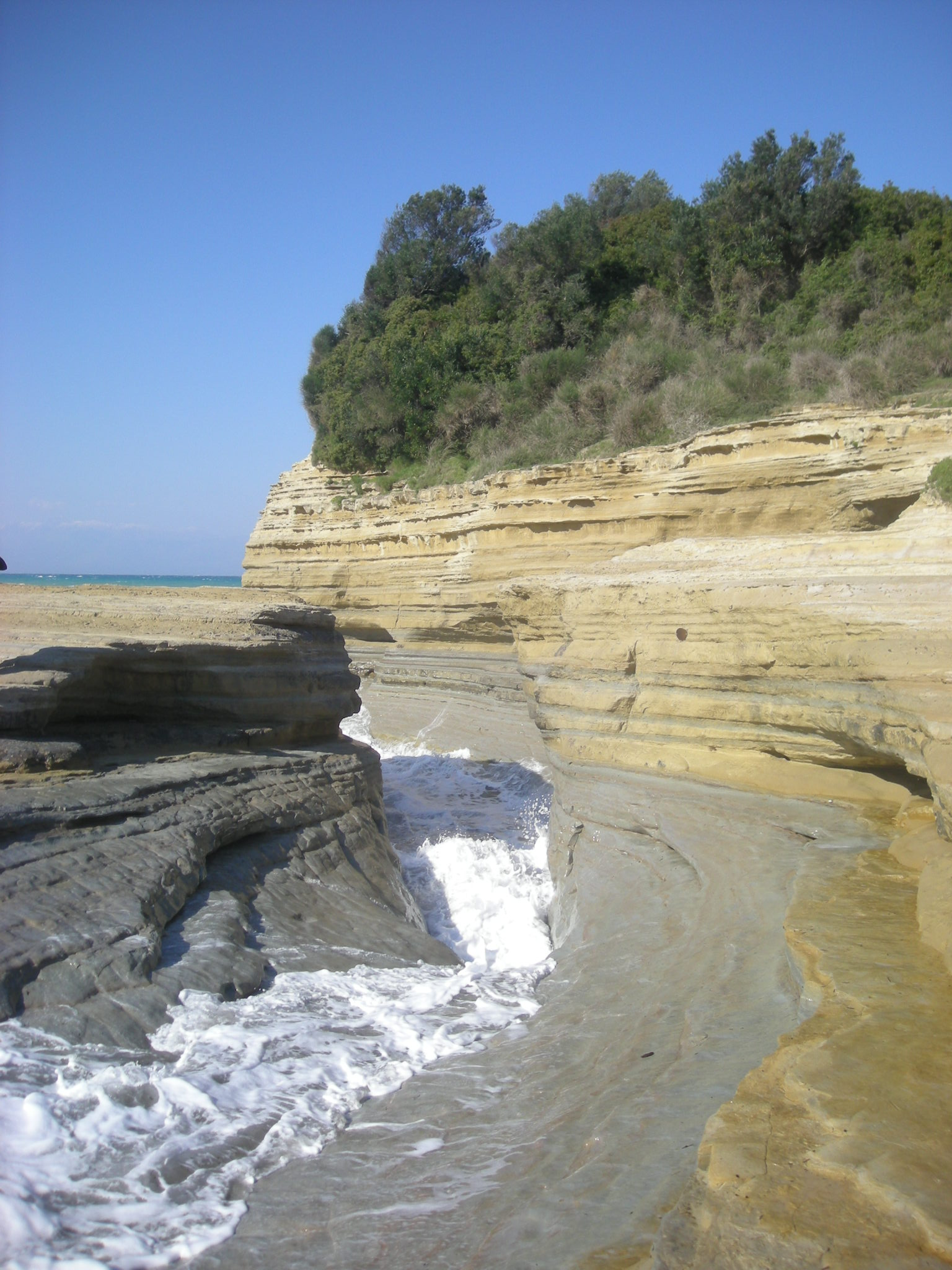 Κανάλι της Αγάπης στο Σιδάρι.